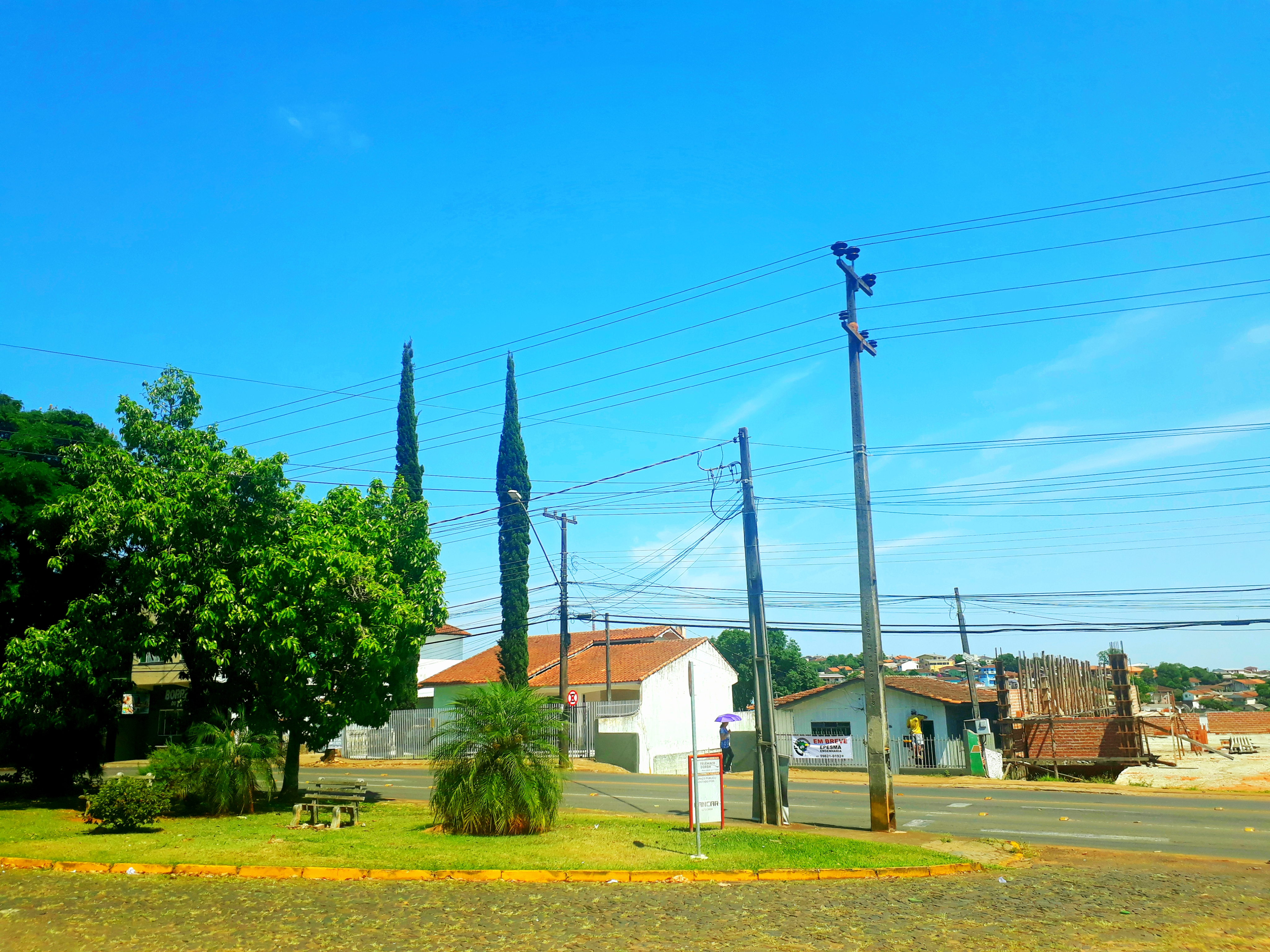 Imagem do trecho da avenida Marechal Floriano Peixoto, no bairro Socomim, em Telêmaco Borba, Paraná.